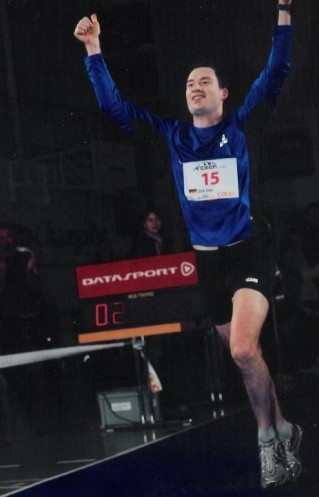 Dirk Joos, la sola vira kuranto, kiu dufoje gajnis la Zurikan Novjarmaratonon (2010 kaj 2011).